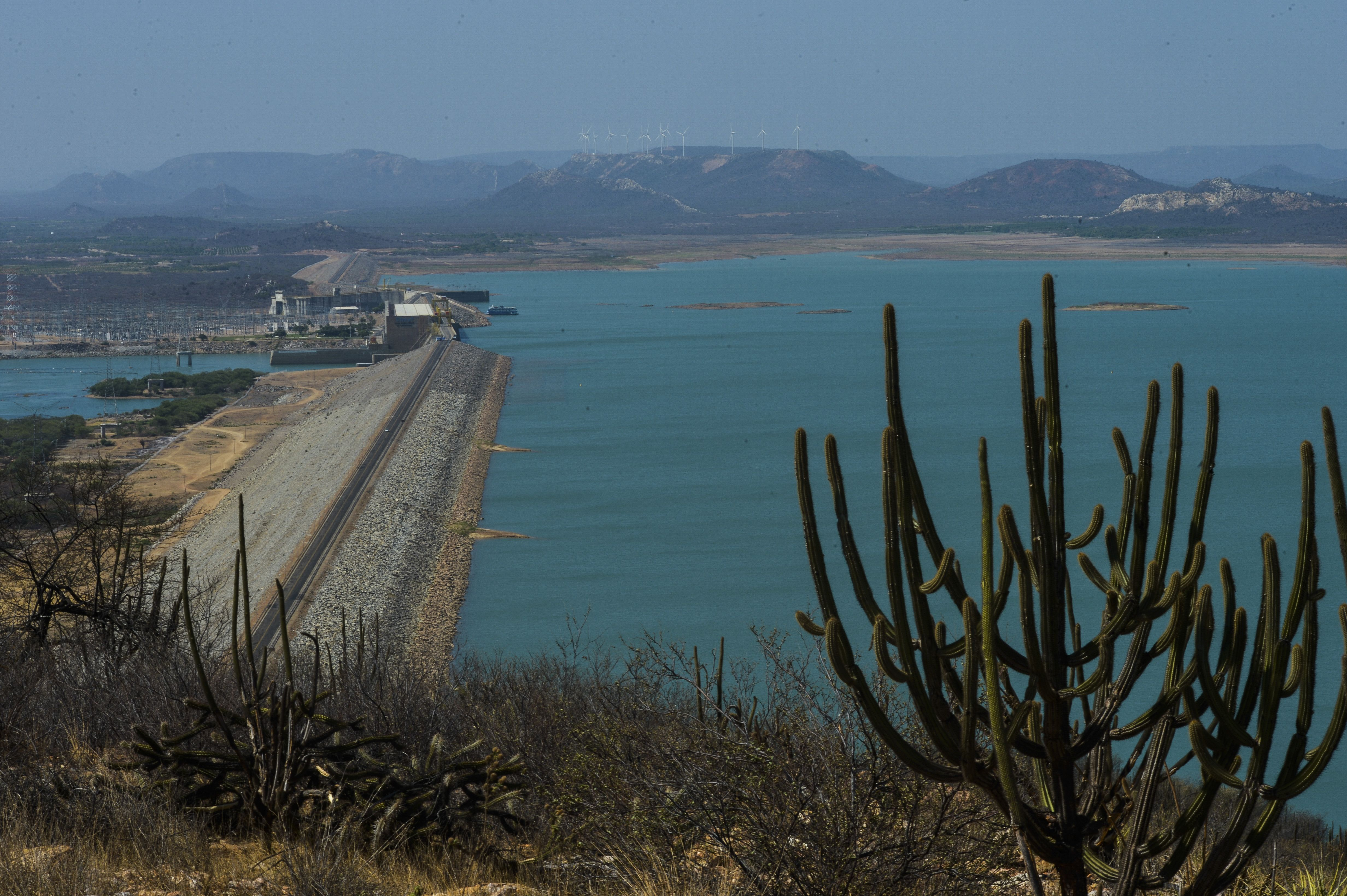 Remanso (BA) - Com a falta de chuva na nascente do Rio São Francisco, o reservatório de Sobradinho vive a maior seca de sua história.